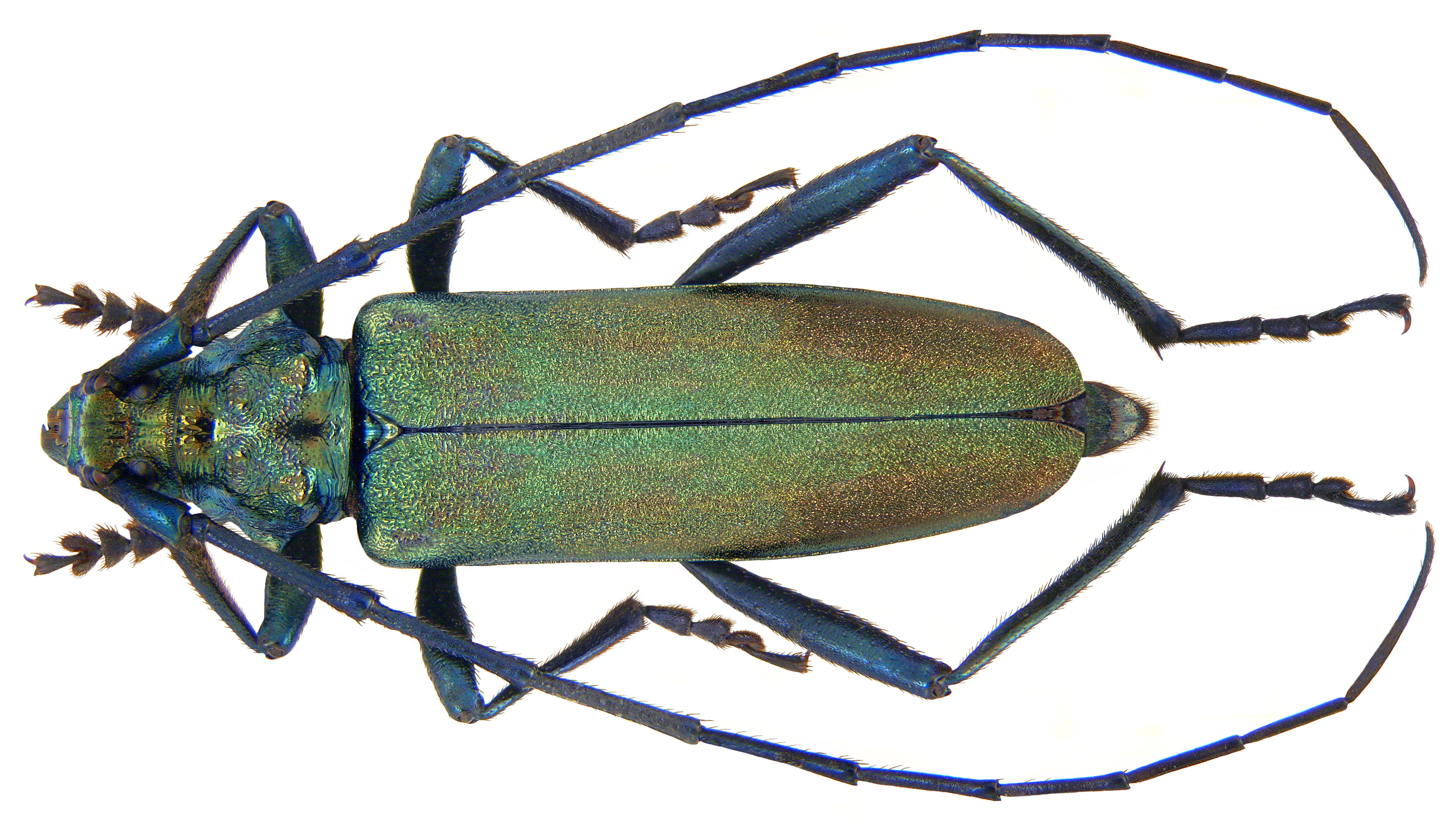 Familie: Cerambycidae Groesse: 21 mm Verbreitung: Europa, Sibirien, Japan Ökologie: Entwicklung in Weiden, selten in Pappeln und Erlen Fundort: Italien, Südtirol, Vinschgau, Staben leg. det. G.Rößler, 1972 Photo: U.Schmidt, 2009